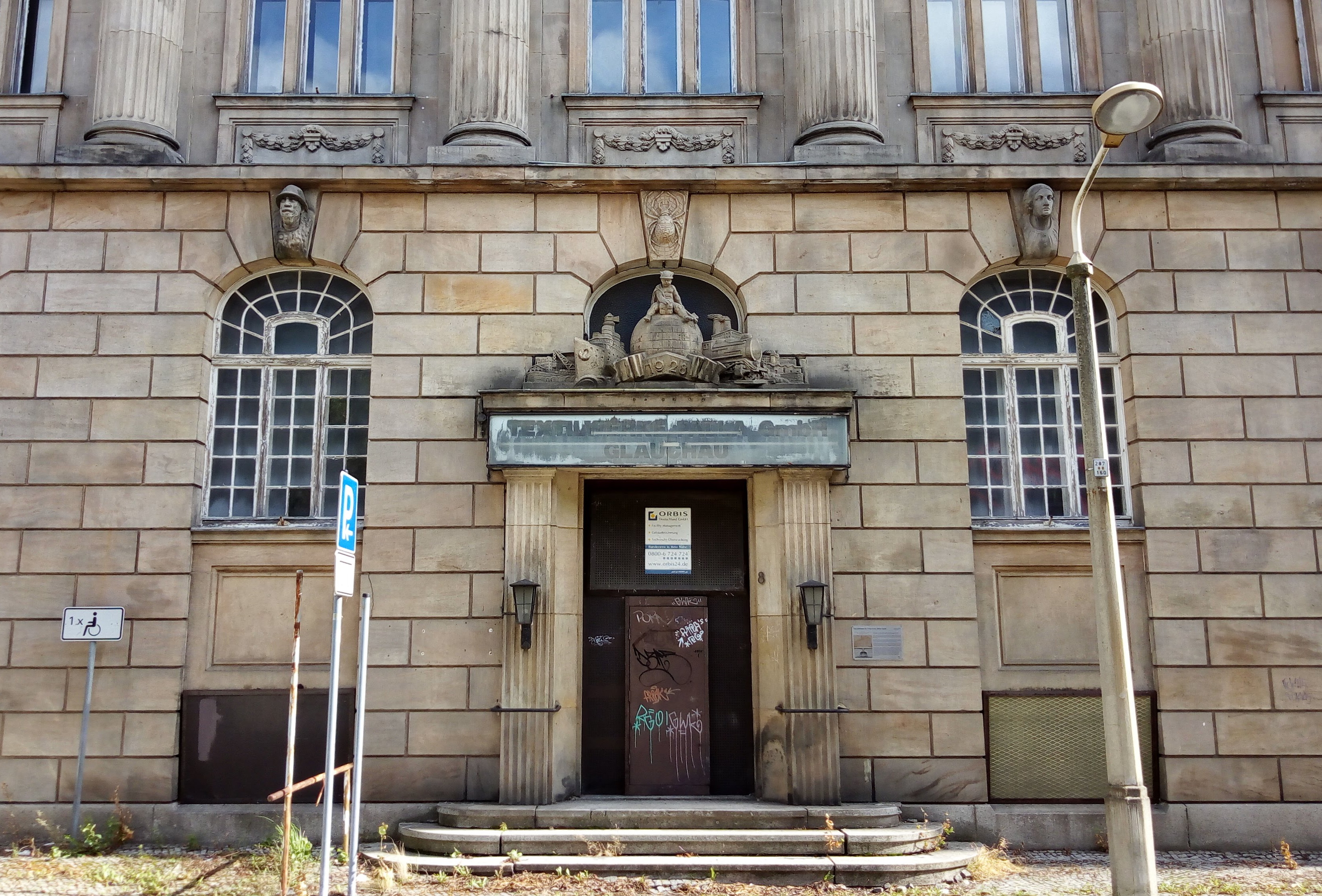 Industriebrache Palla in Glauchau